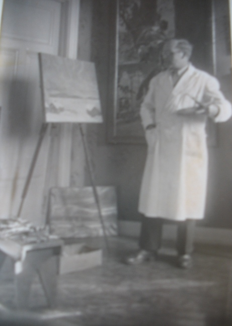 Målaren Einar Hillberg, fotograferad i sin ateljé i Bräcke.